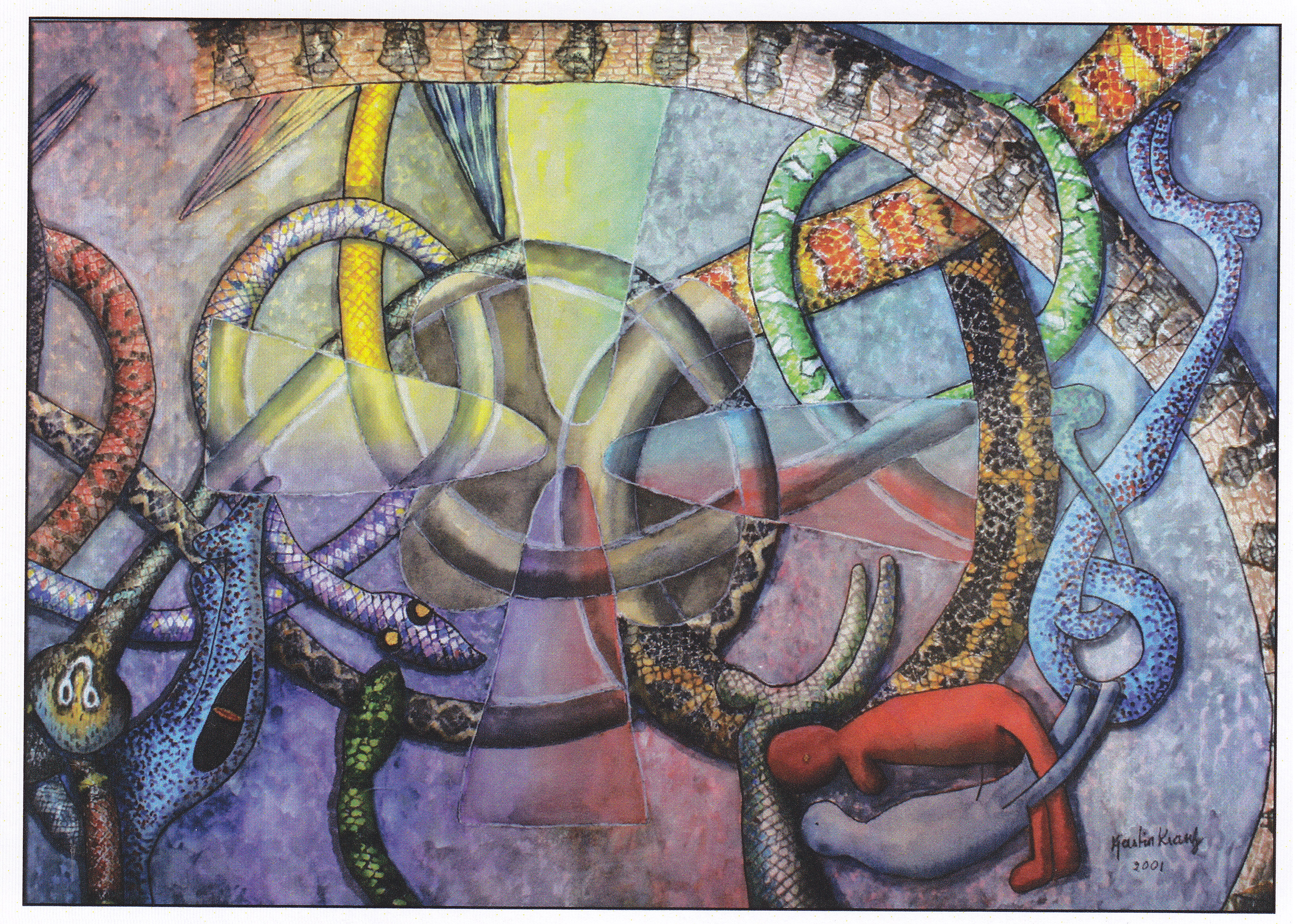 "Rig" av Kjerstin Krantz, från boken Rigs Vandring